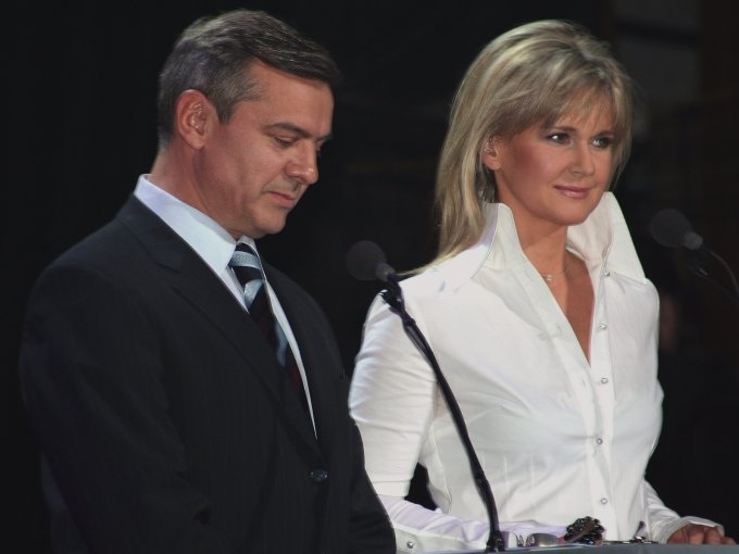 Jerzy Baczyński and Grażyna Torbicka (Polish journalists)